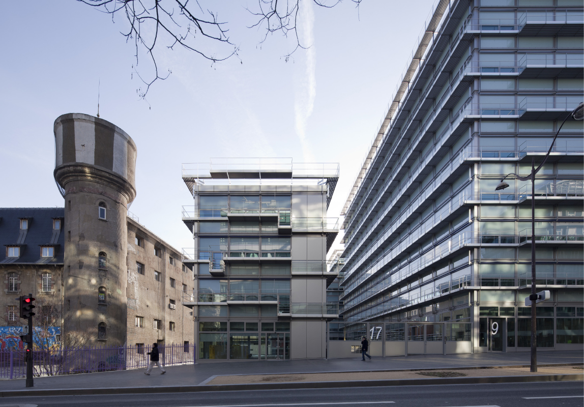 Les frigos, Immeuble de Bureaux, par Francis SOLER